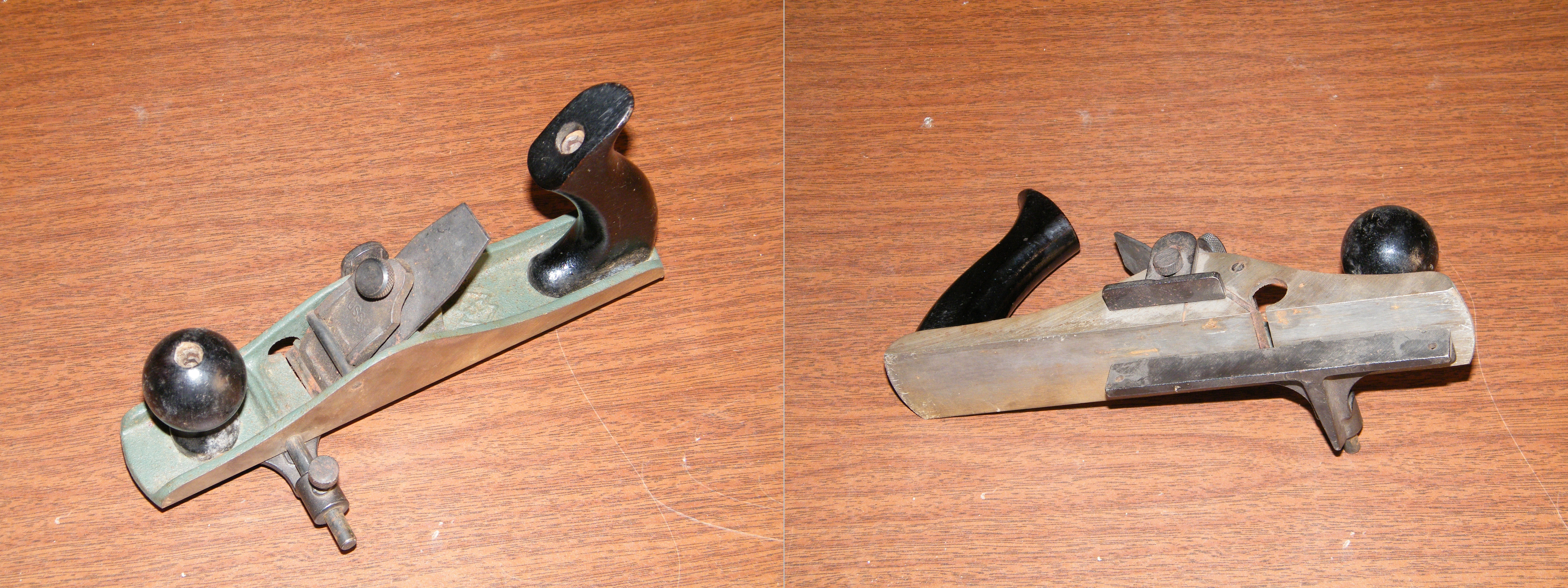 Фальцгебель